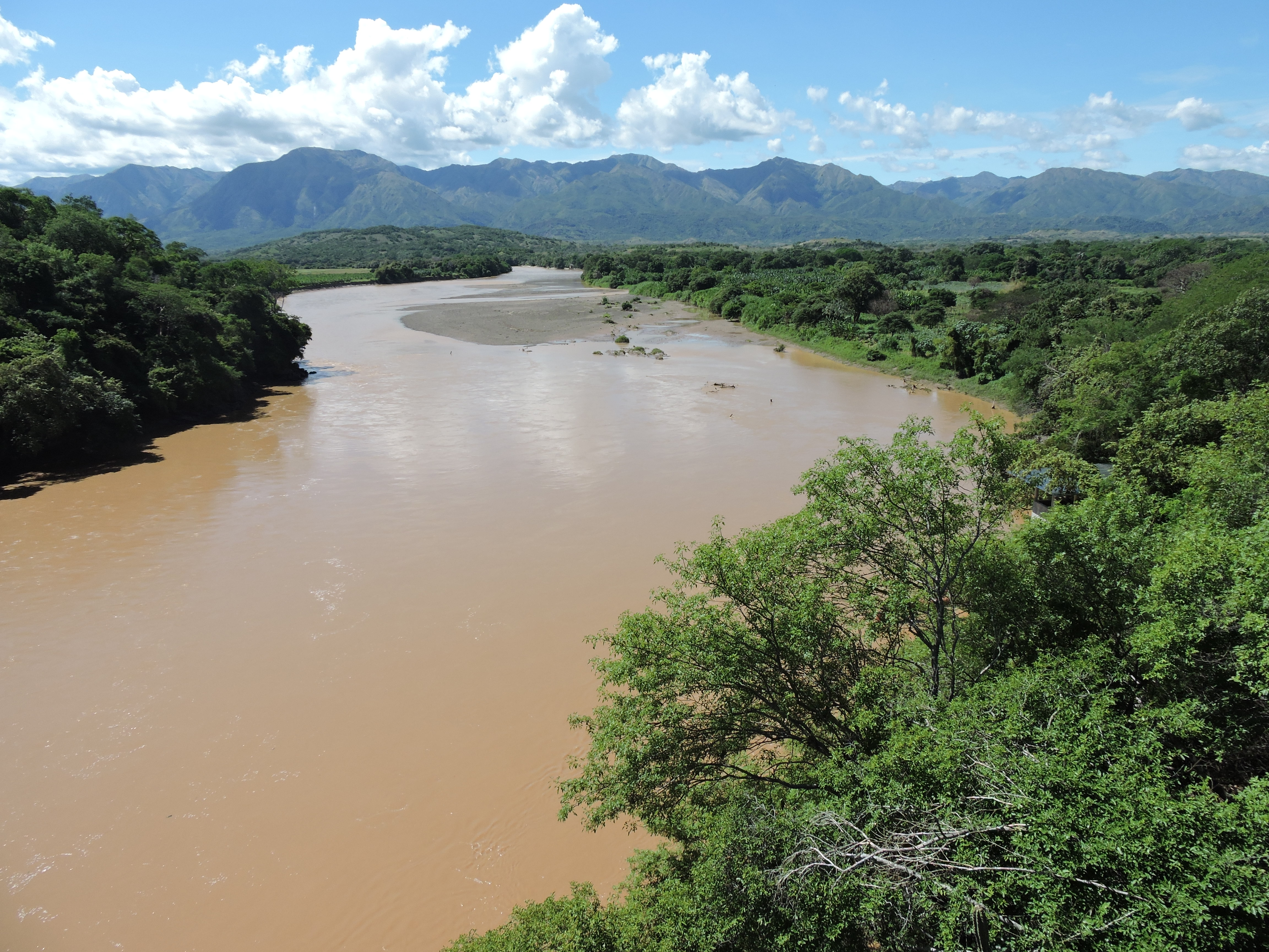 Rio Magdalena cerca al municipio de Villa Vieja Esta fotografía fue tomada en el municipio colombiano con código 41872.